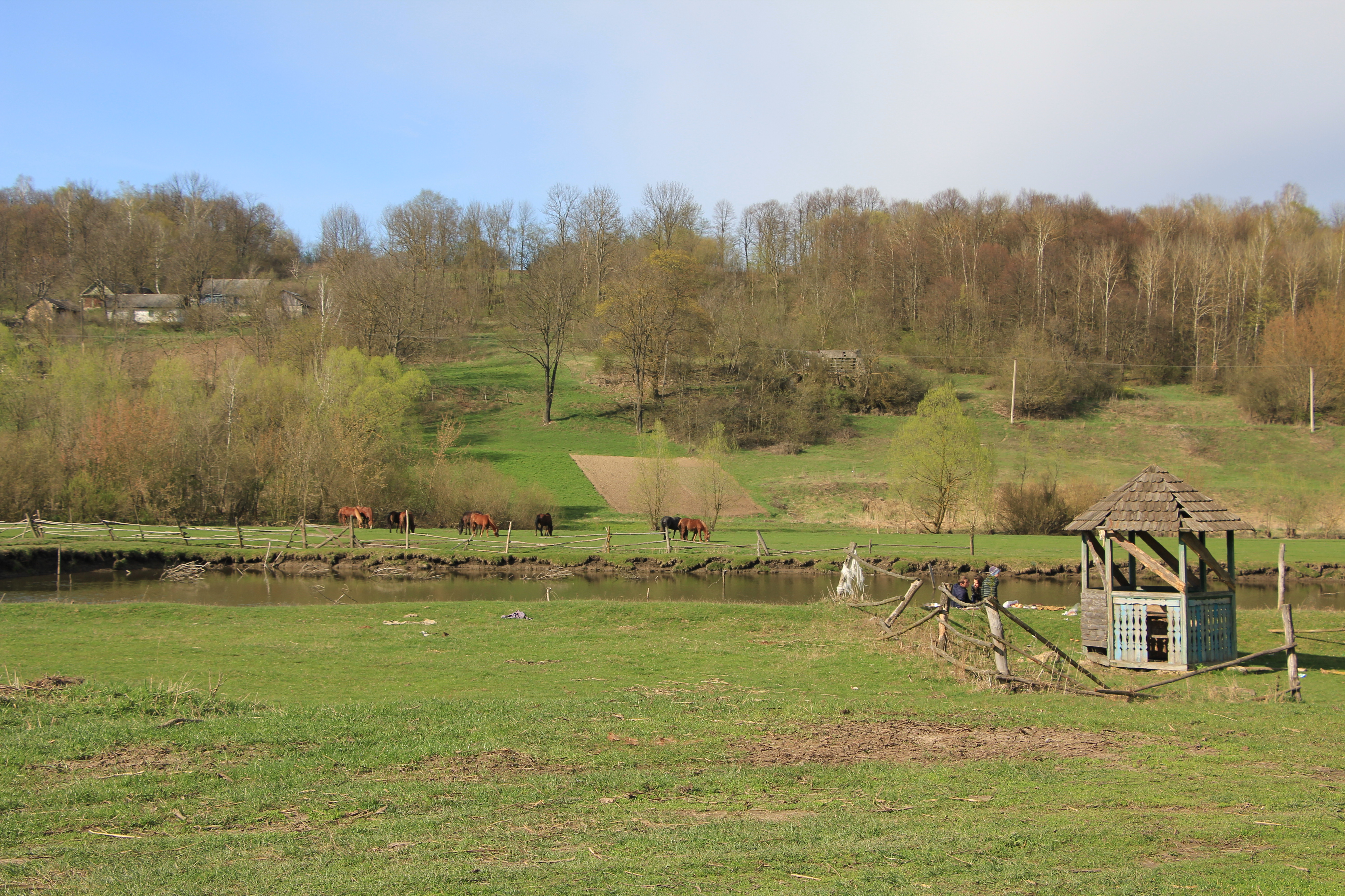 Став в селі Старий Олексинець Кременецького району Тернопільської області